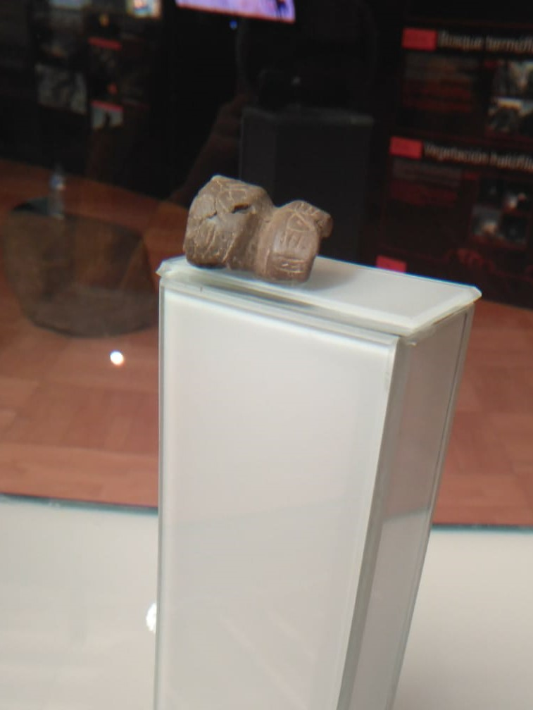 Símbolo bereber de pequeño tamaño encontrado en La Palma, en concreto en Garafía.